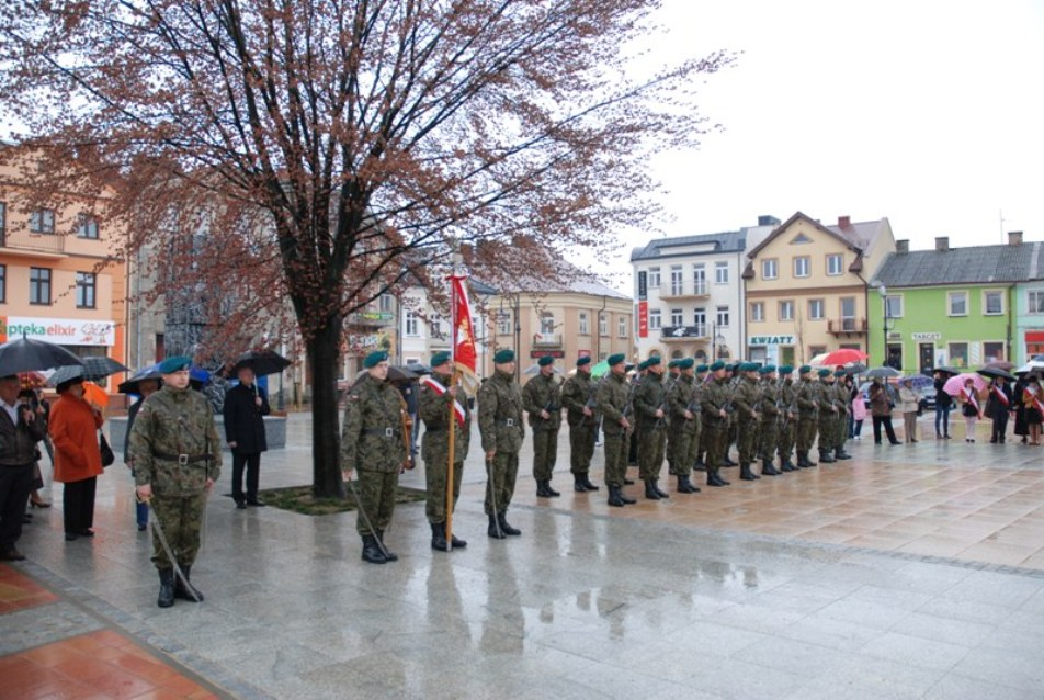 Garnizon Przasnysz, 3 maja 2013r. Kompania honorowa JW 5699 podczas uroczystości z okazji 3 Maja